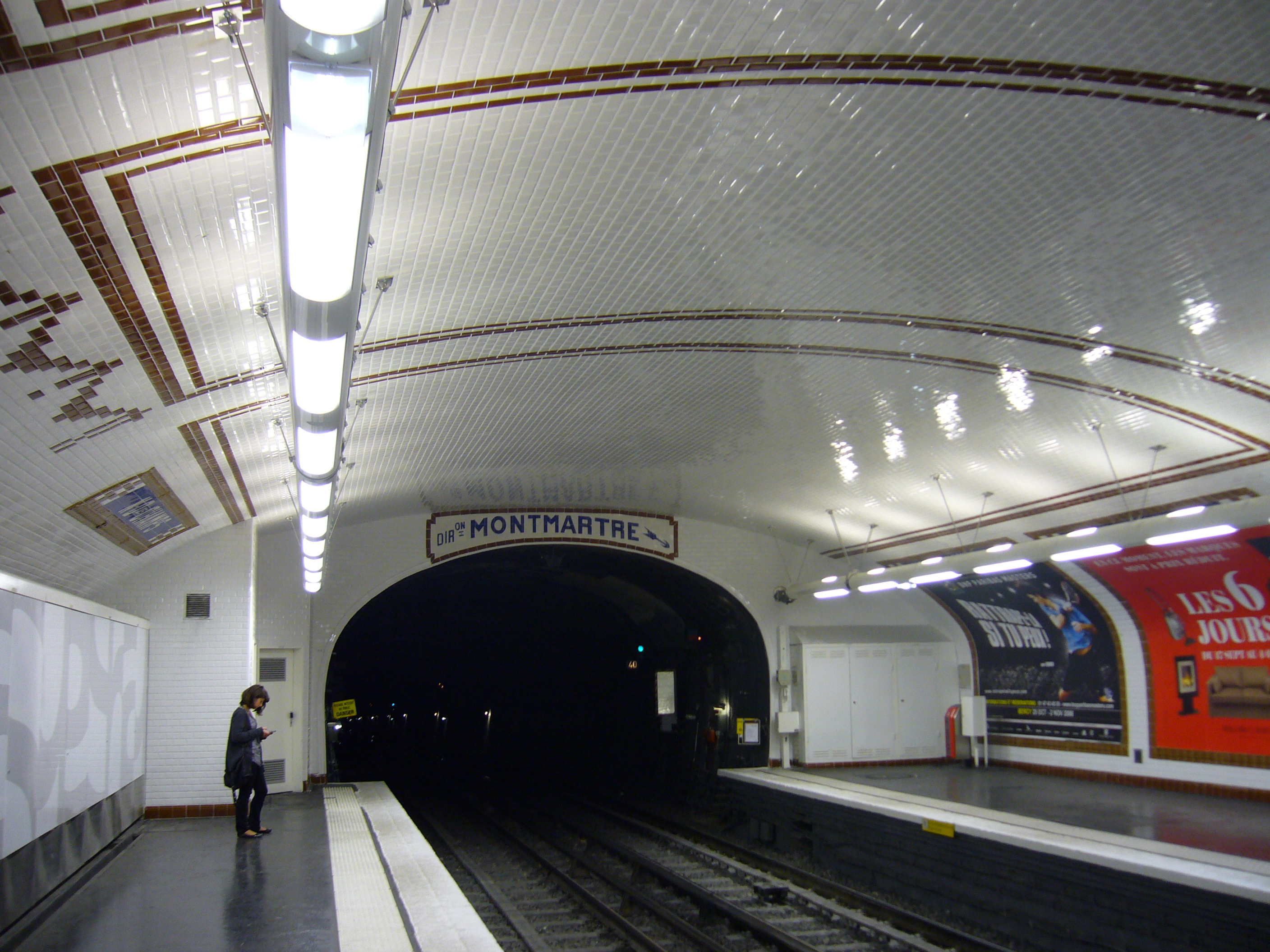 Station Notre-Dame-des-Champs sur la ligne 12 du métro de Paris.